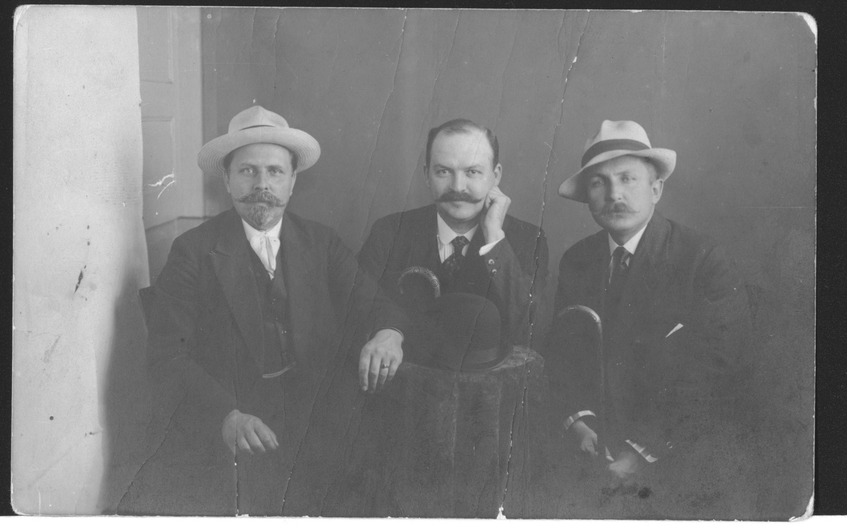 Замков Алексей Андреевич (муж В. И. Мухиной, справа). Полная фотография с родственниками - друзьями детства (Буренков Павел Андреевич - слева, Чуренков Кузьма Васильевич - в центре). Из архива Филатова Олега Владимировича.